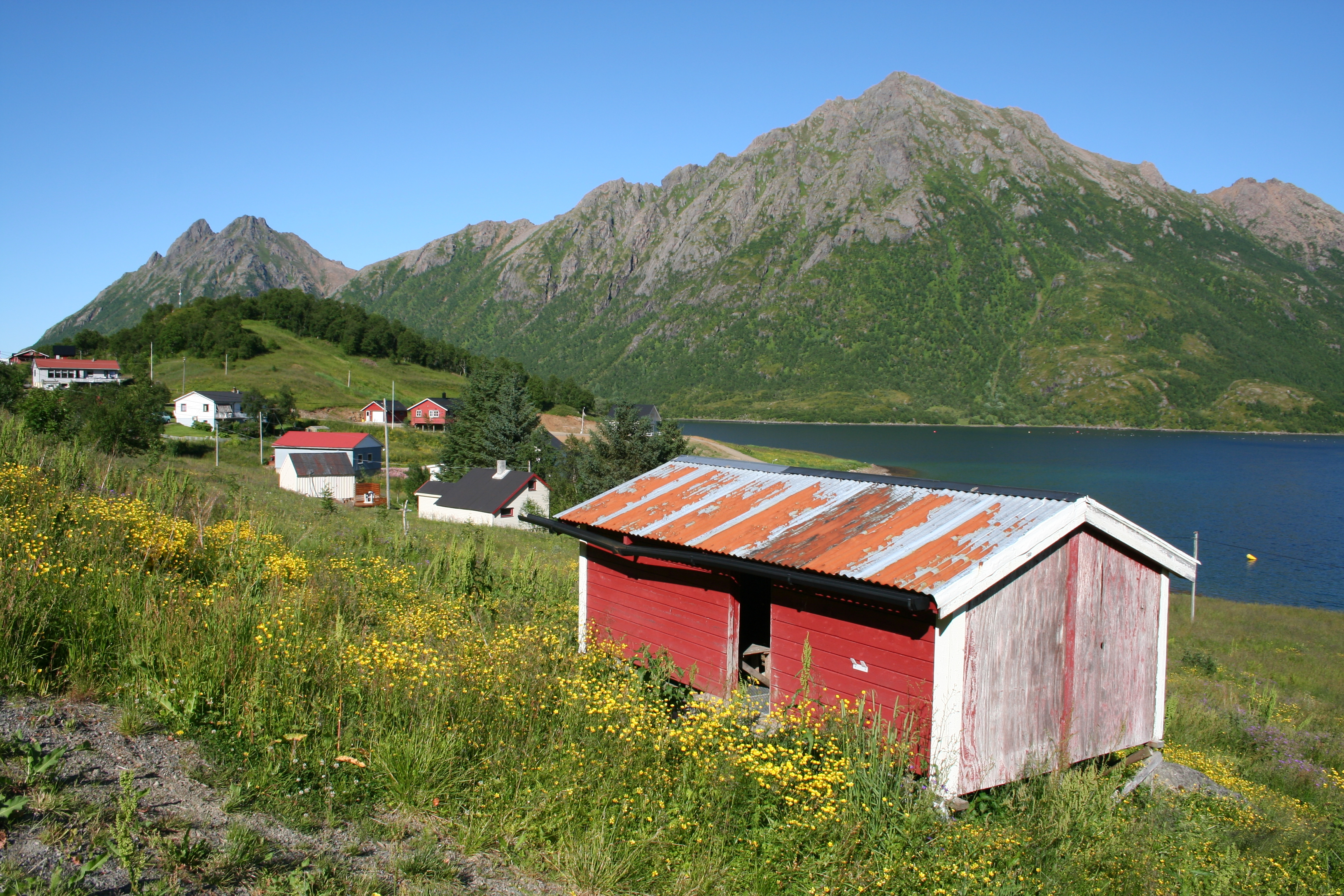 Romset in Øksnes, Norway